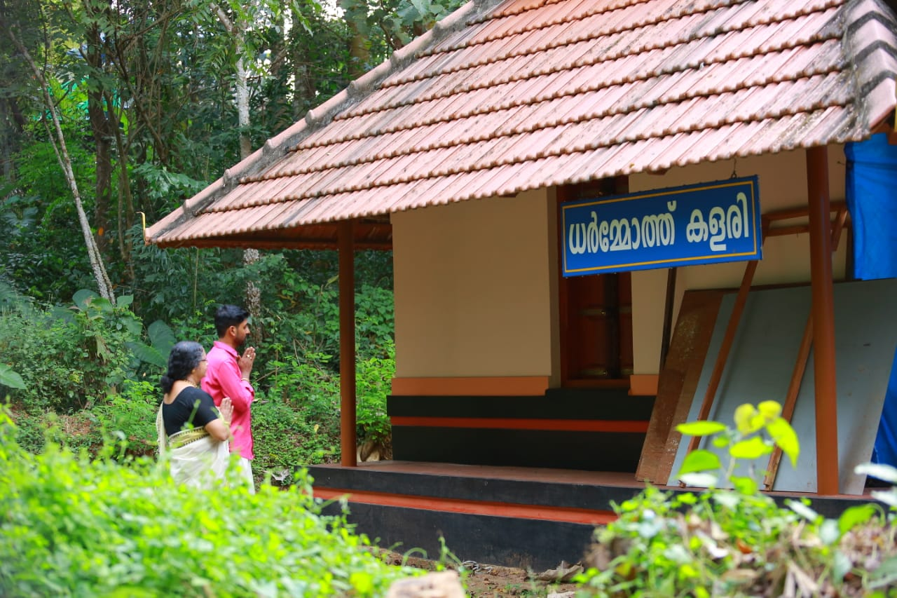 തമ്മെ പണിക്കരുടെ കളരി (2017-ൽ പുതുക്കിയ രൂപം)